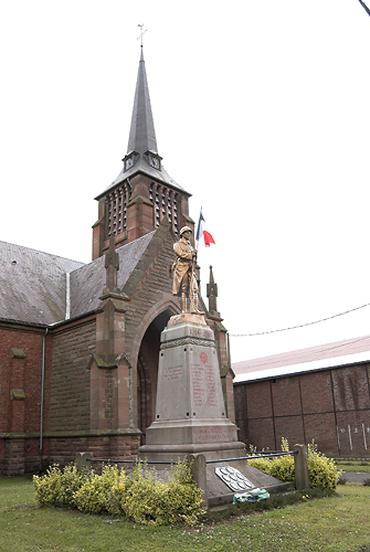 é‰glise et monuments aux morts de Beugny, Pas de Calais.